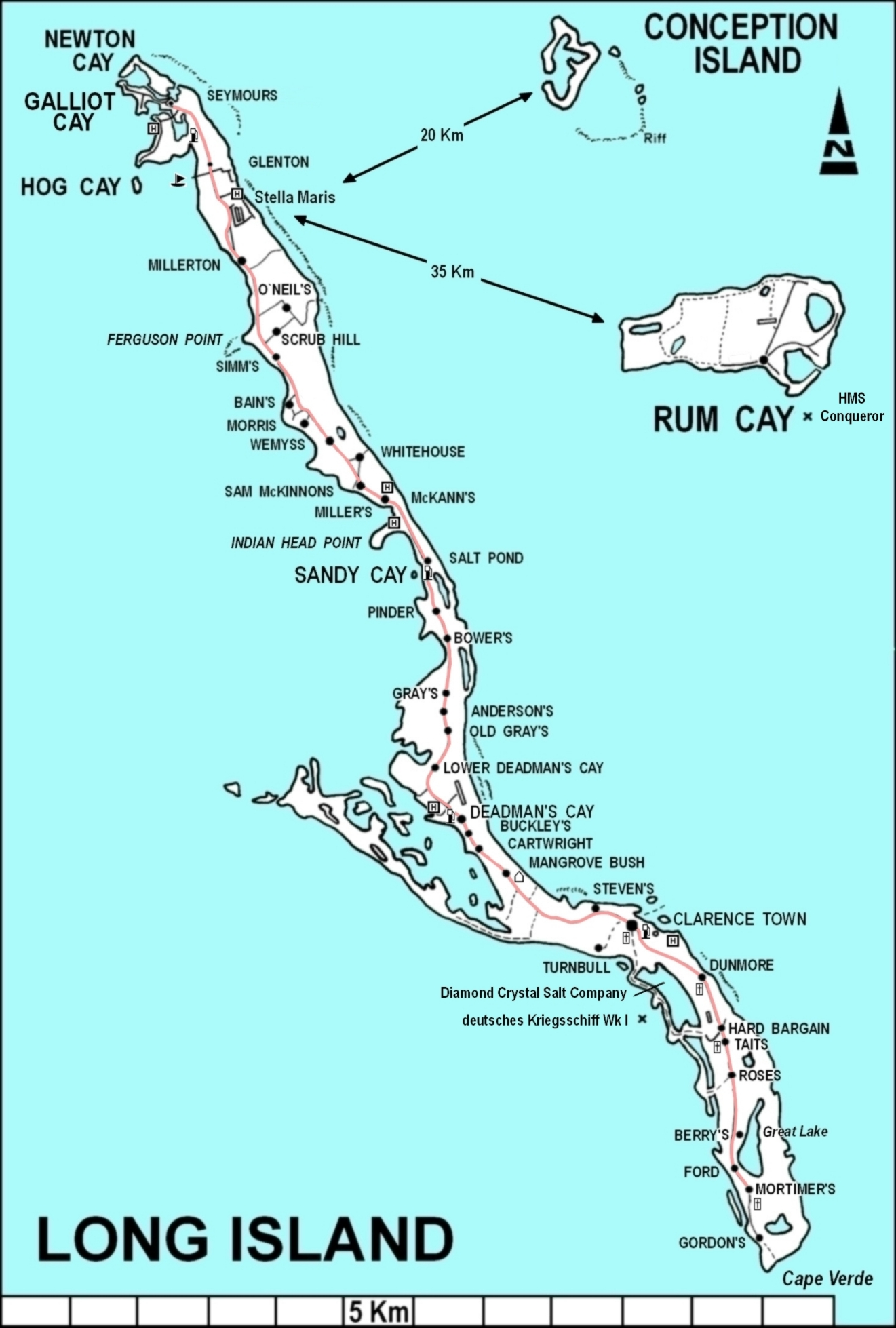 Karte von Long Island, Bahamas